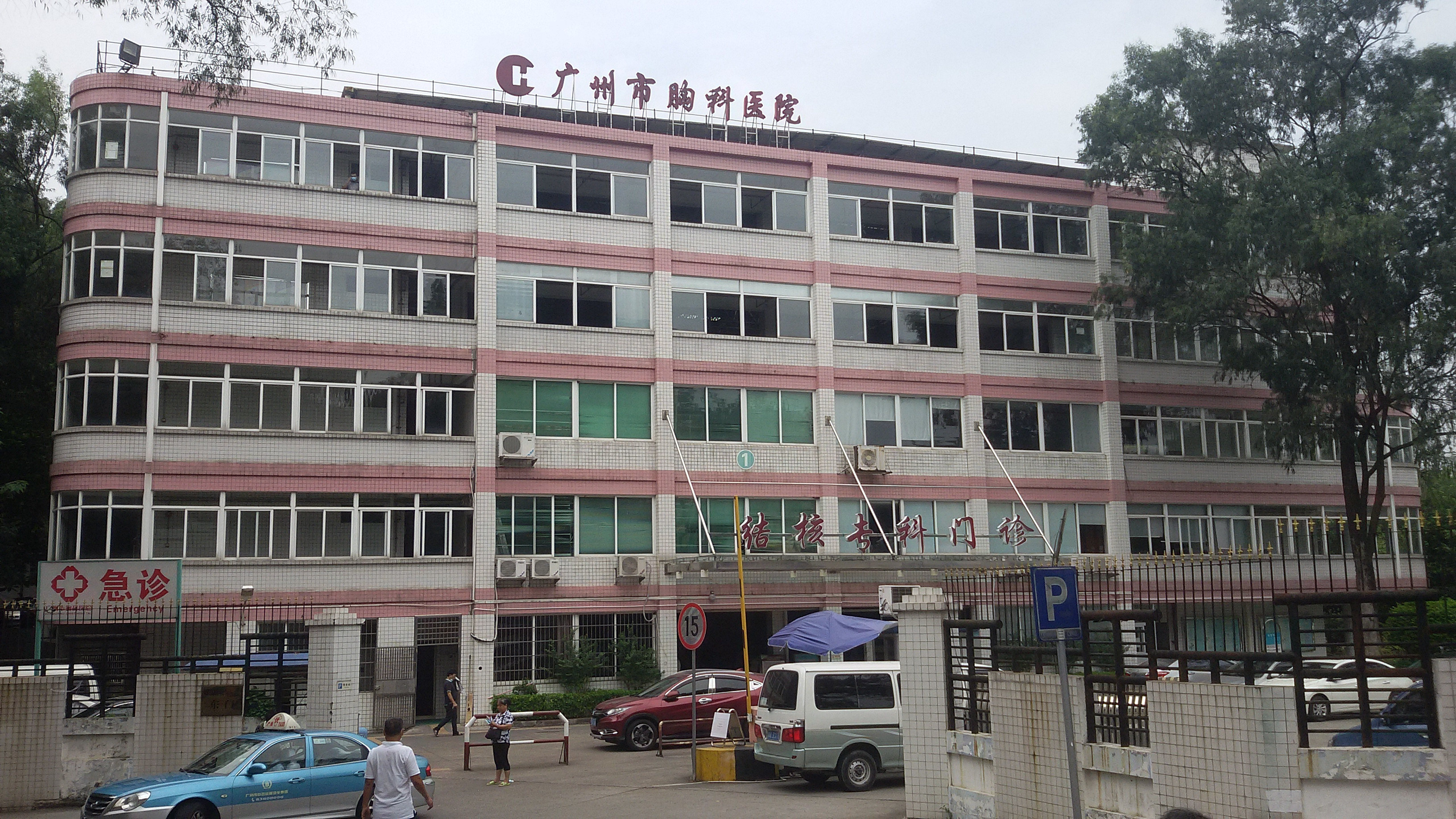 粵語: 廣州市胸科醫院（東門）